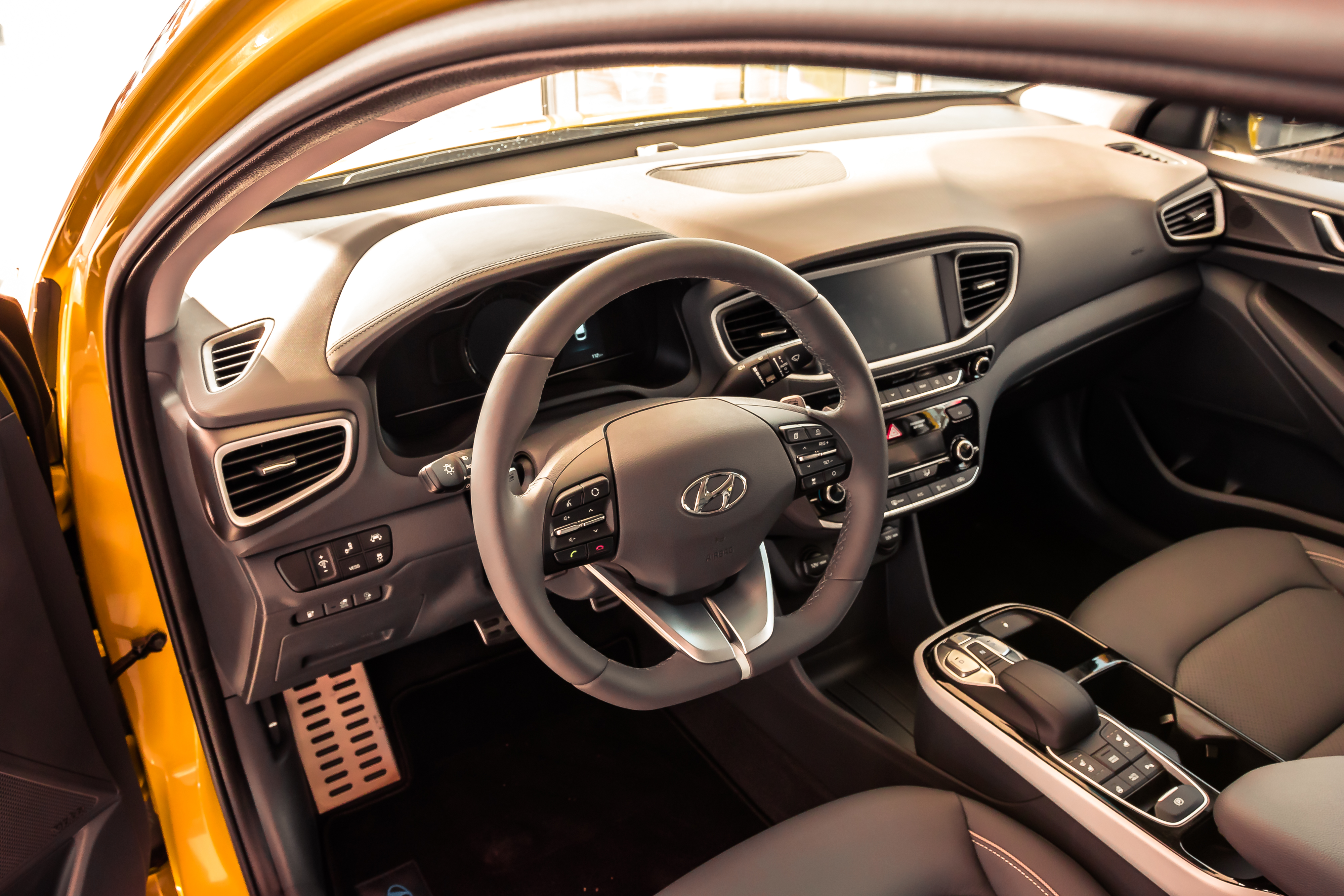 Probefahrt des Hyundai IONIQ Electric in der Farbe Blazing Yellow. Ausstattung: Premium.